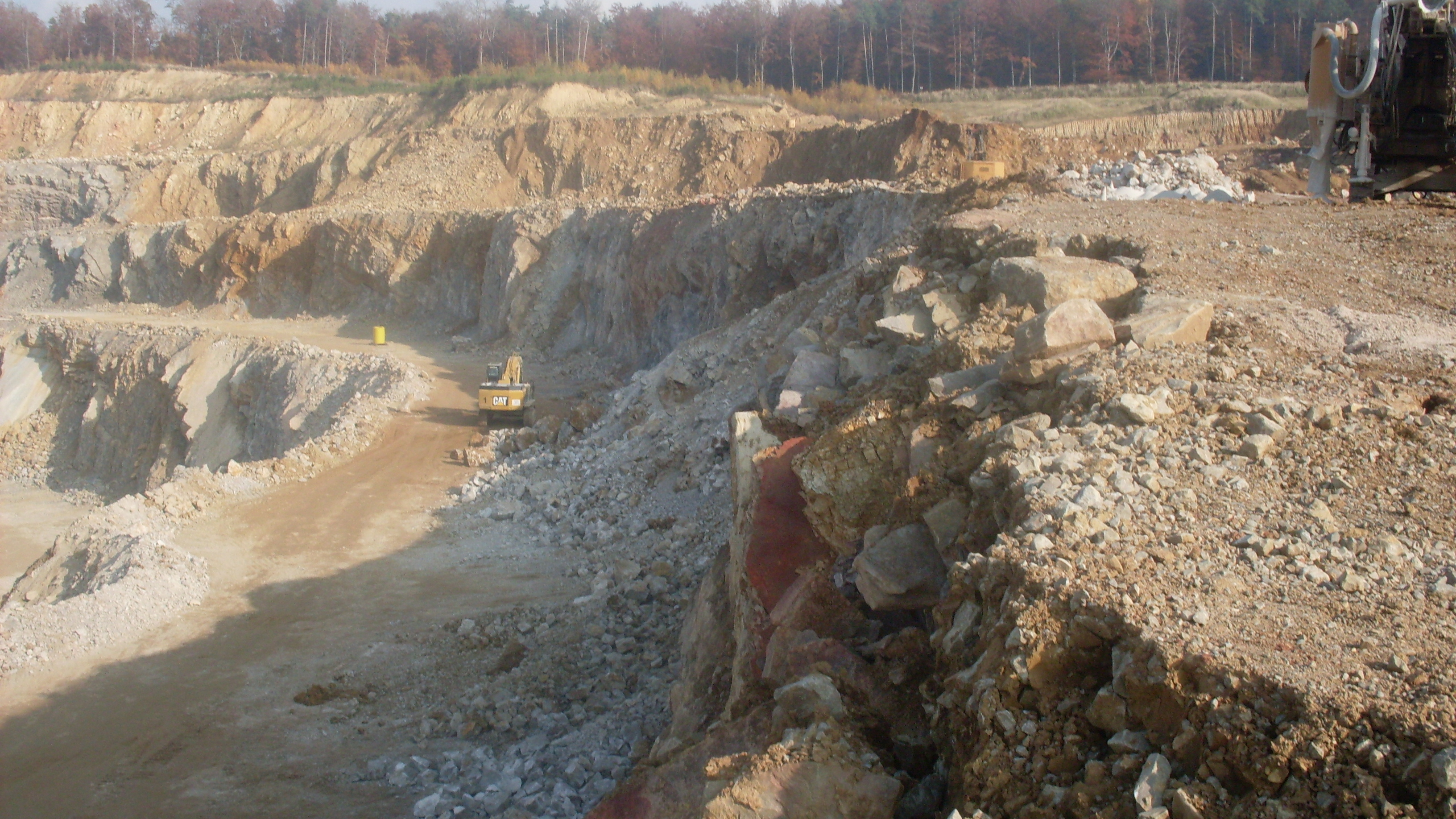 Mazurowa Góra.Kamieniołom Czatkowice